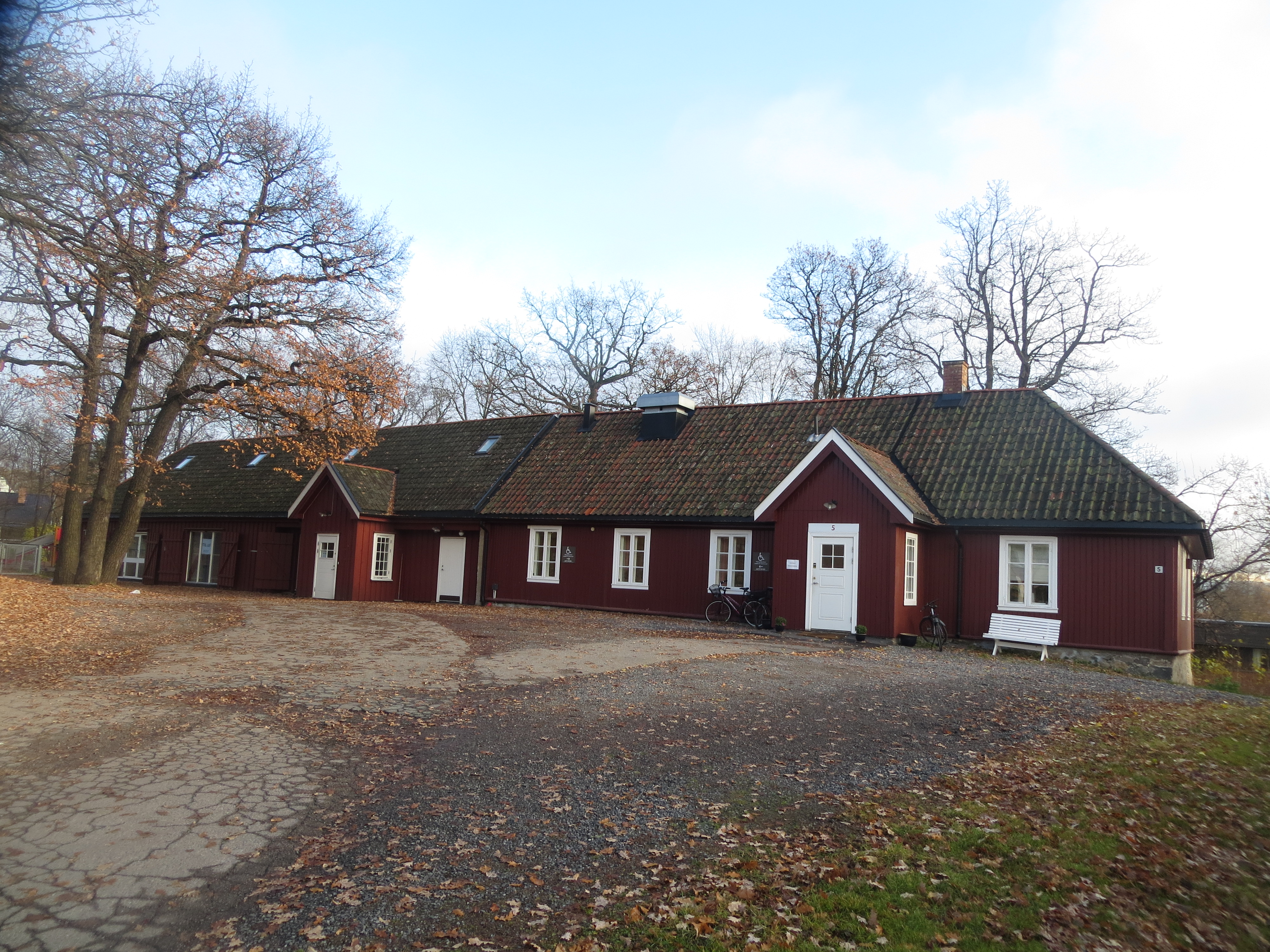 Steinerud gård i bydel Vestre Aker ligger inne på Diakonhjemmet Sykehus i Oslo, og benyttes (2014) av sykehuset. Gården har bygningsvern.